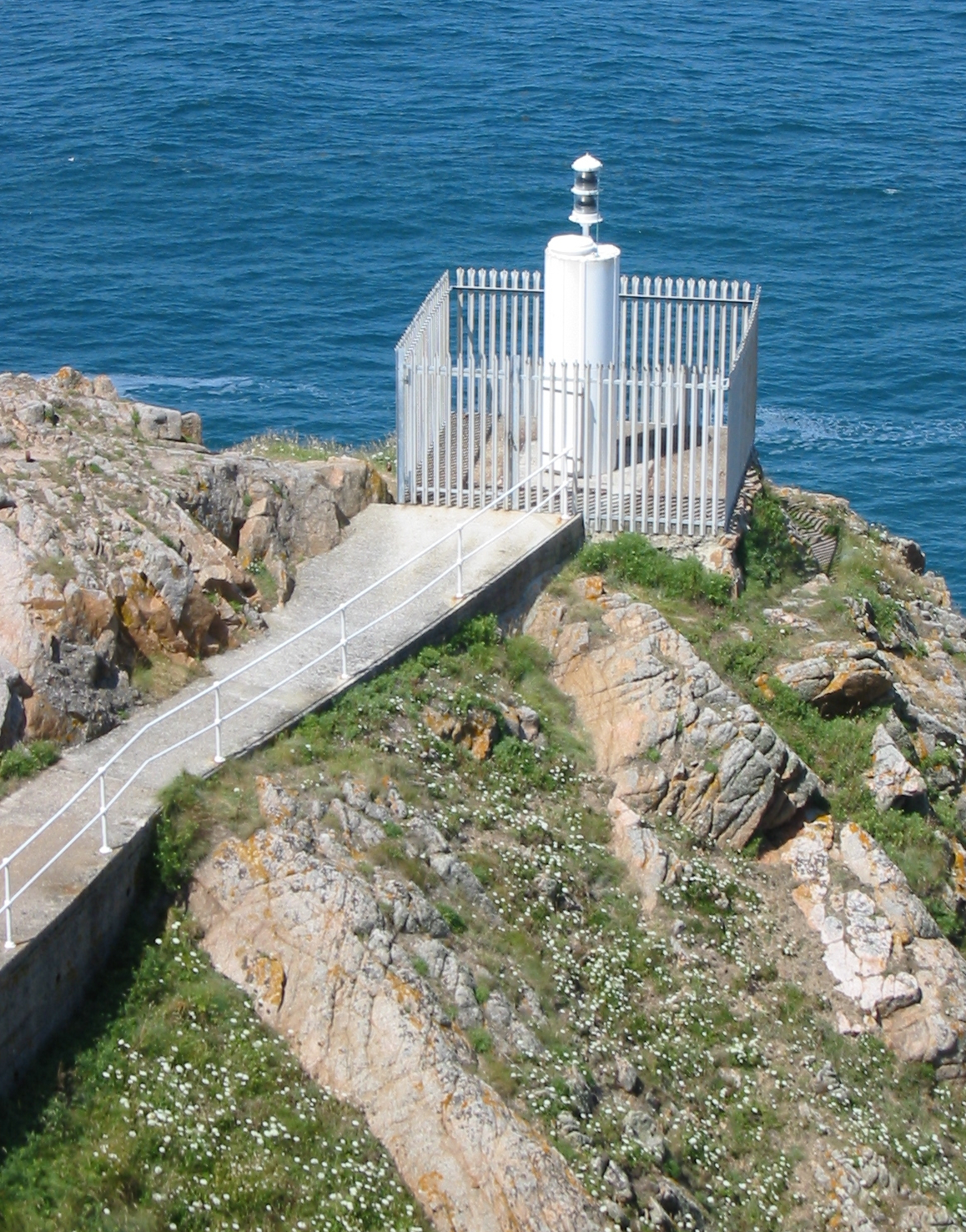 Nrf: Saint Ouën, Jèrri, 5 d'Juilet 2009